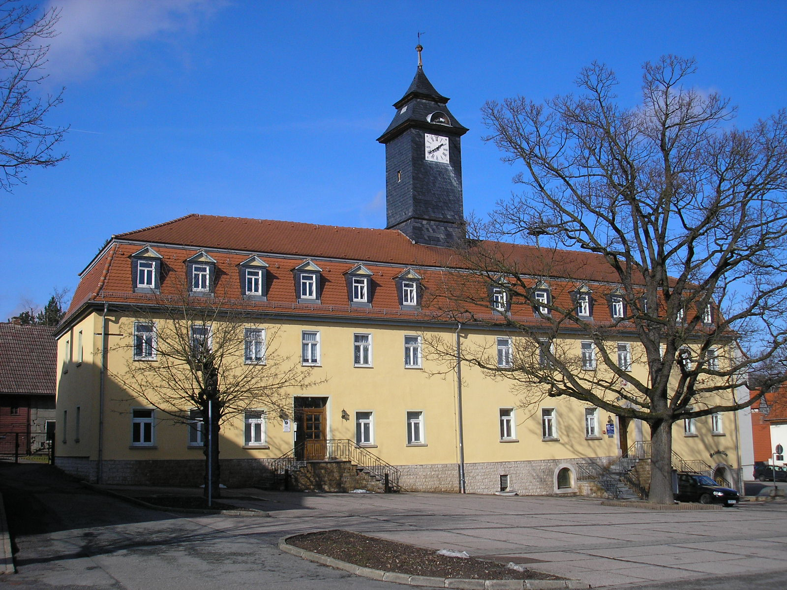 Das Rathaus von Blankenhain (Thüringen).